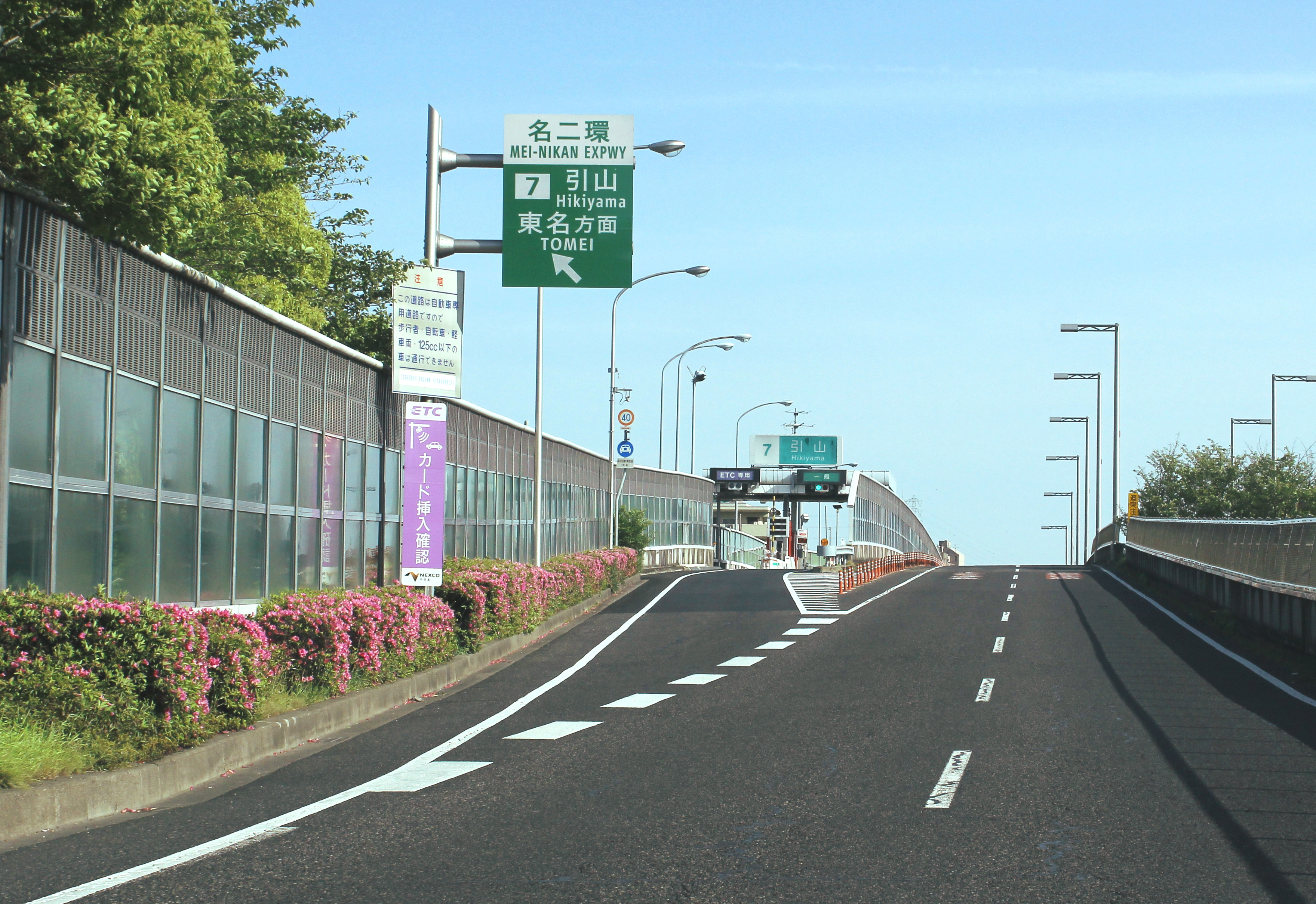 名古屋第二環状自動車道 引山IC